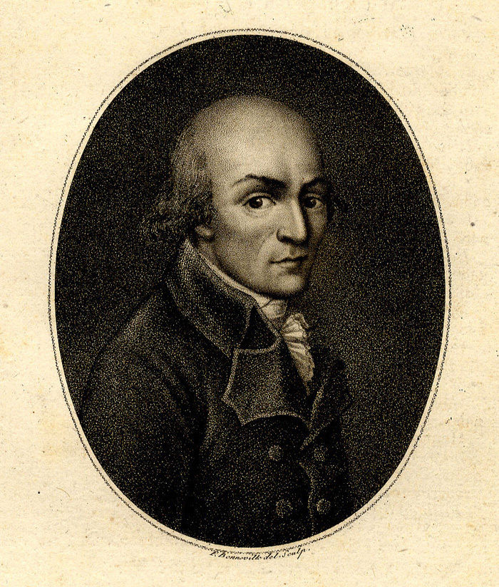 French writer Jean-Baptiste Louvet de Couvray (1760-1797)